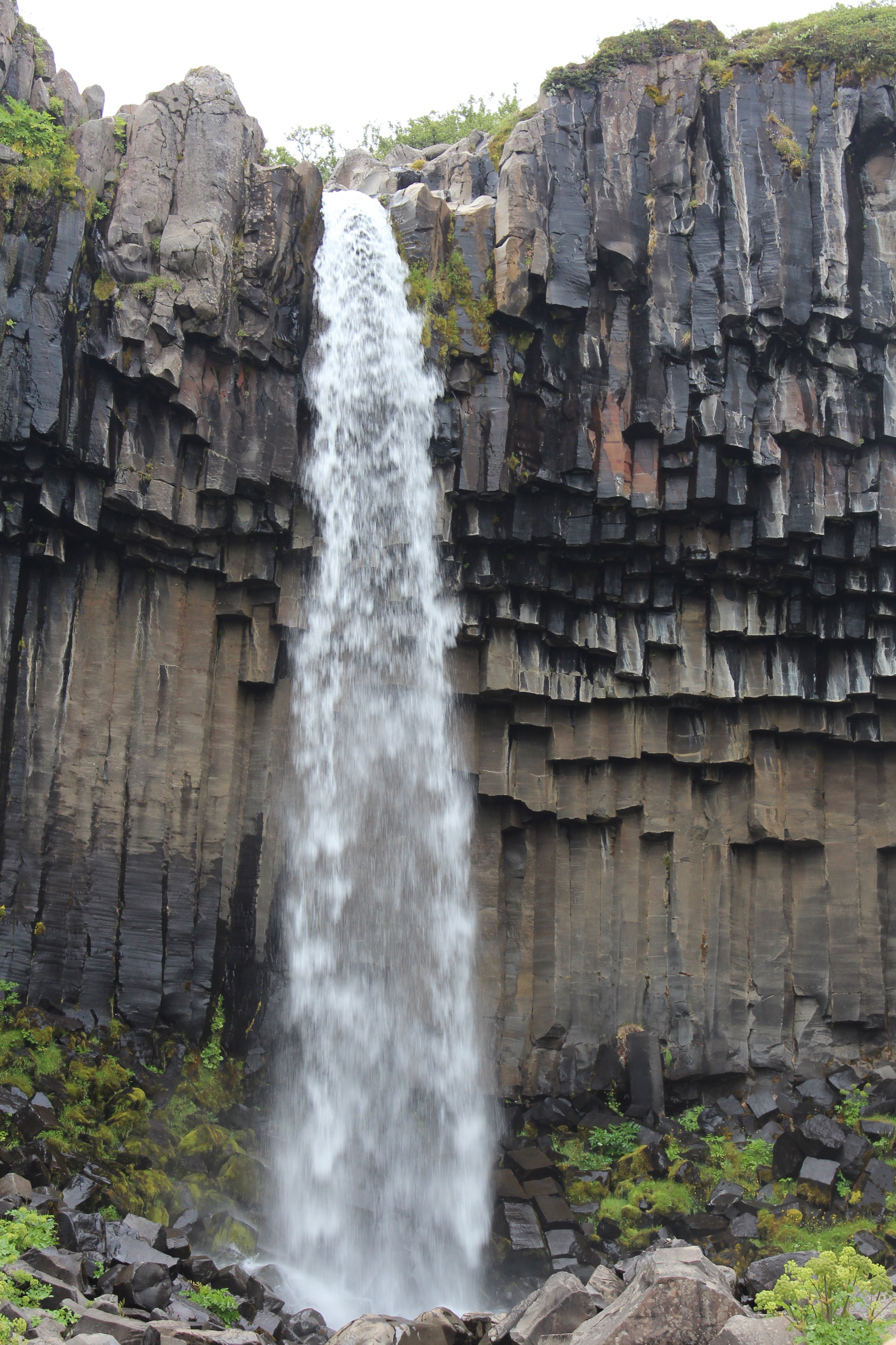 De Svartifoss ("Schwaarze Waasserfall") am Skaftafell-Nationalpark op Island.